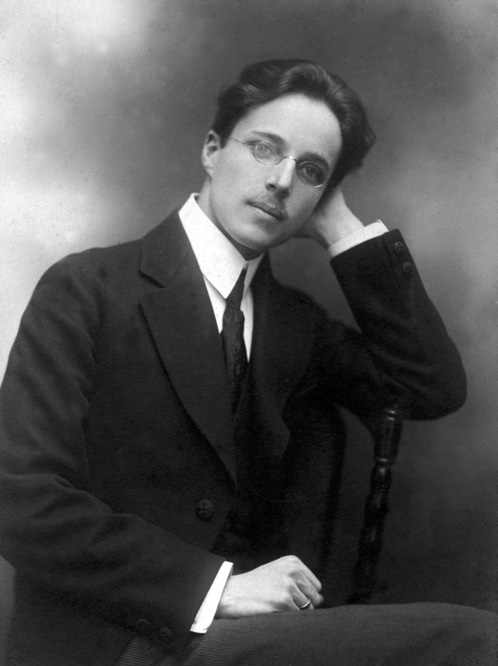 Николай Федорович Яницкий